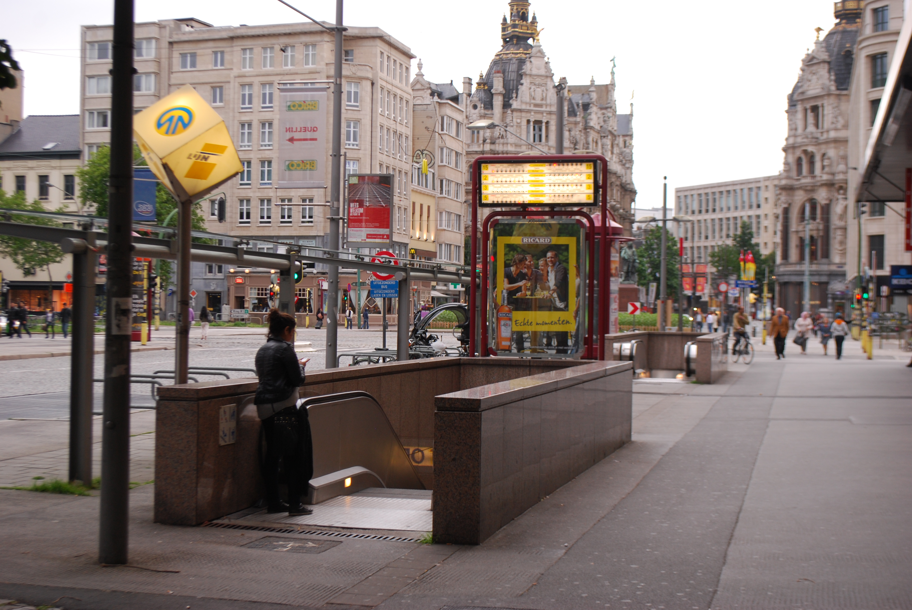 Keyserlei à Anvers.